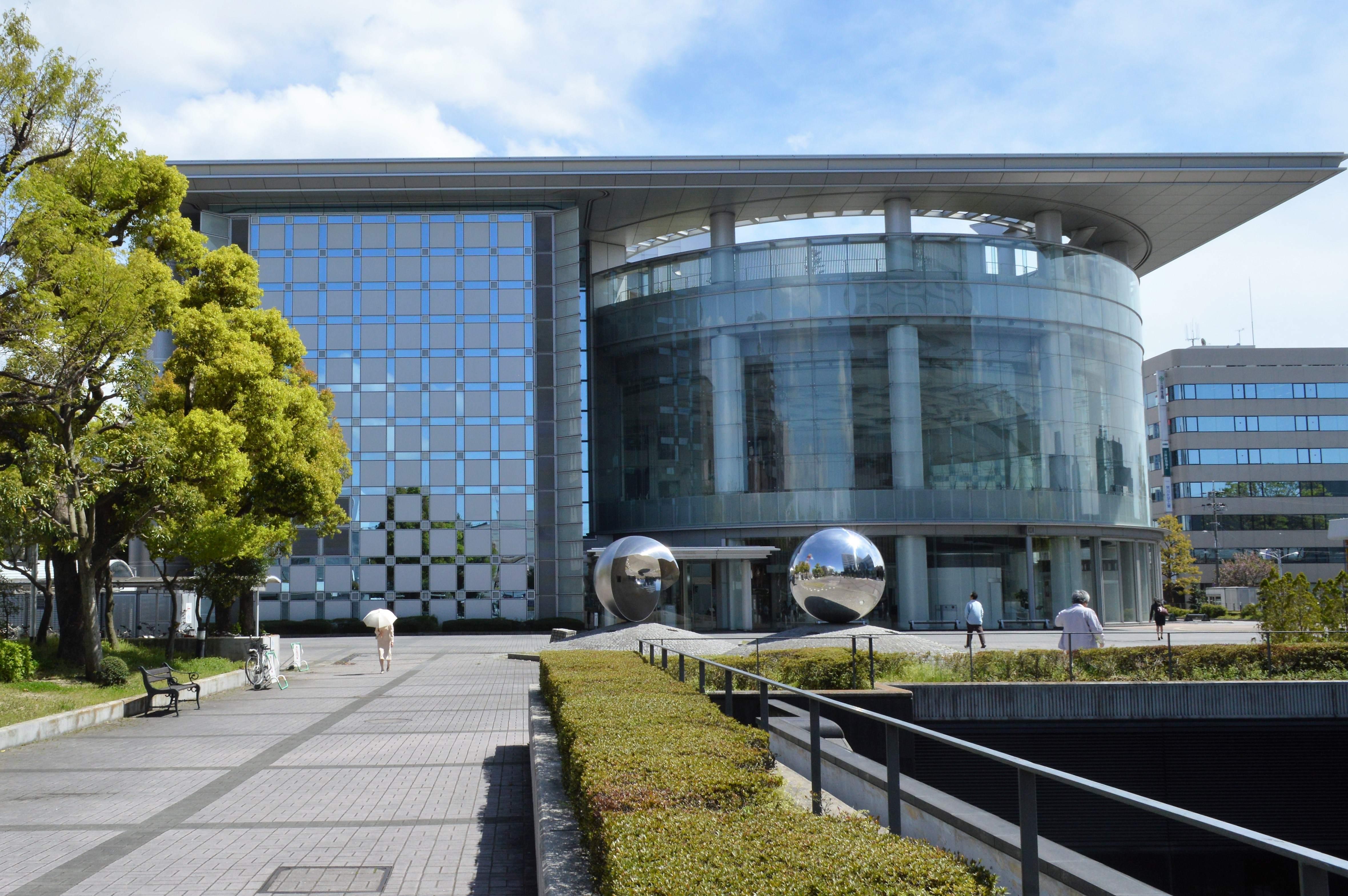 愛知県春日井市の文化フォーラム春日井。